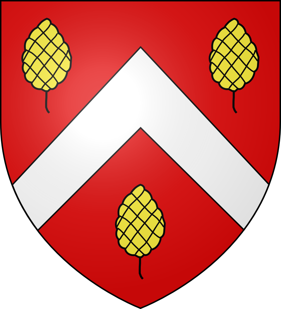 De gueules au chevron d'argent accompagné de trois pommes de pin d'or